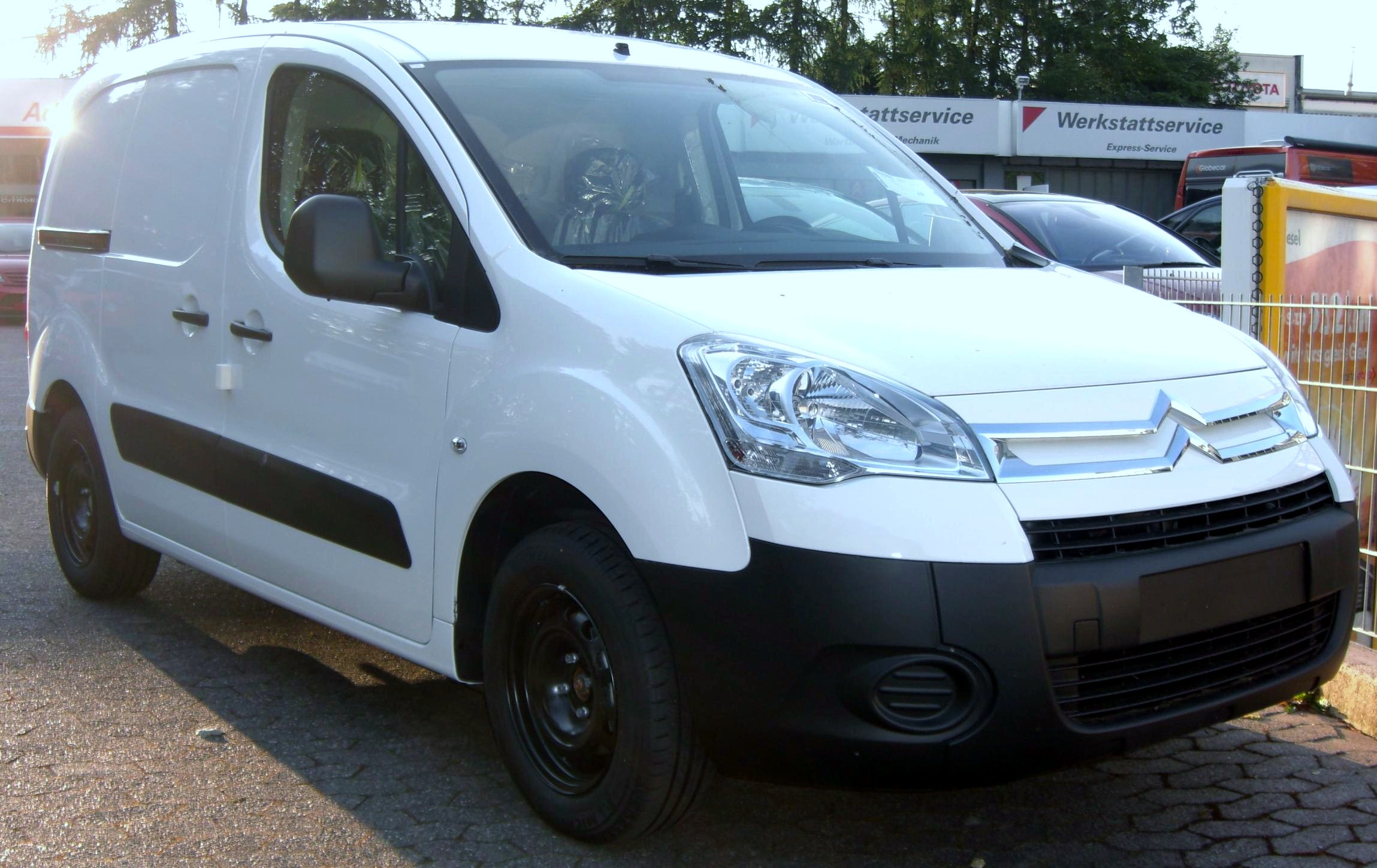 Citroen Berlingo Kastenwagen (2008)